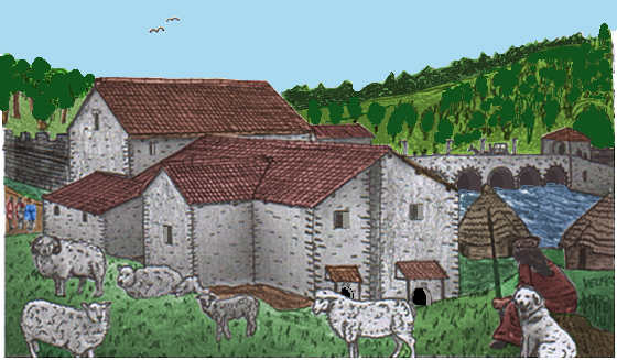 Rekonstruktionsversuch des römischen Badegebäudes von Chesters/Cilurnum, 3. Jahrhundert n.Chr.